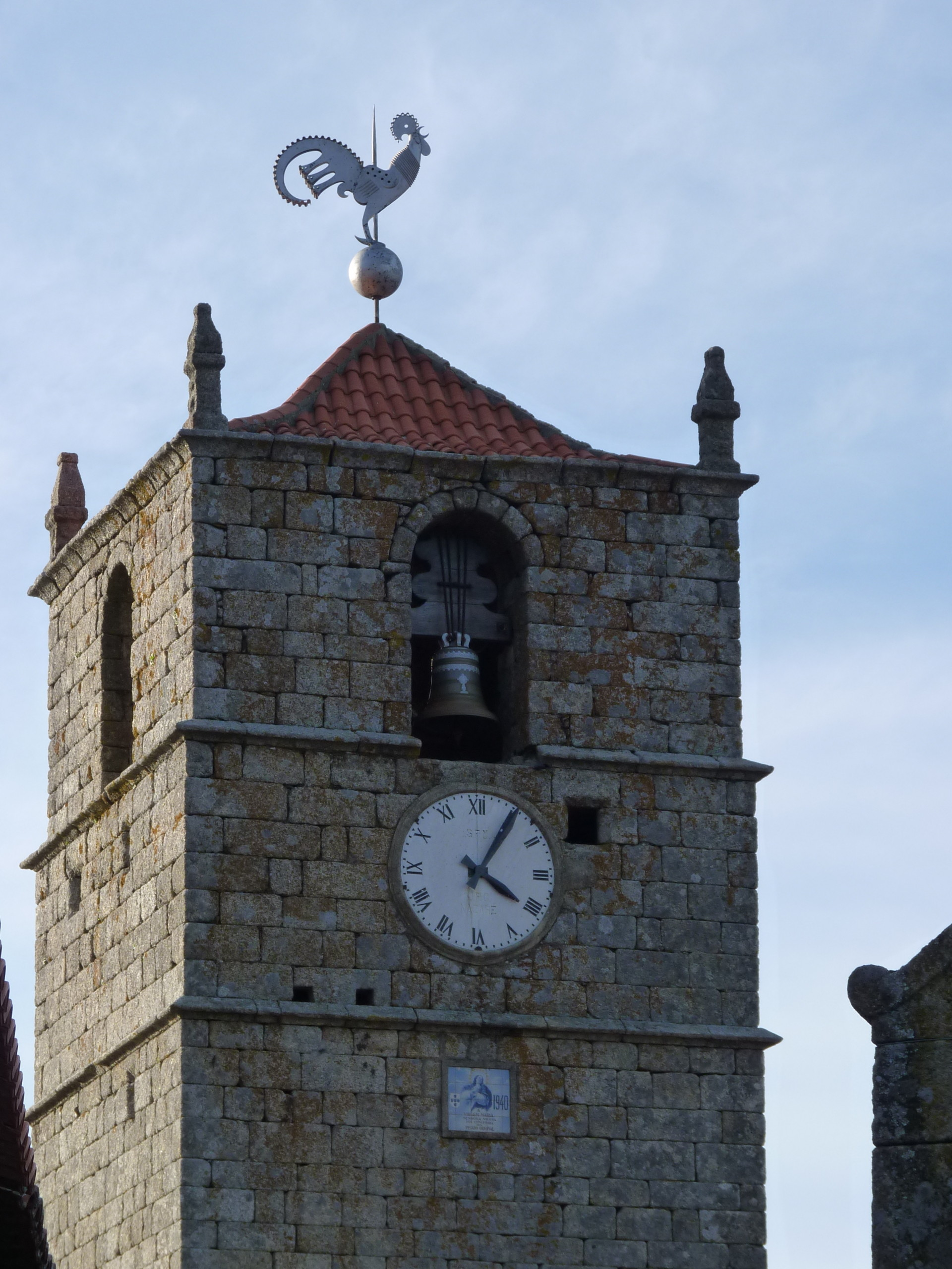 Aldeia Velha de Monsanto This monument is classified as Imóvel de Interesse Público. This file was uploaded for Wiki Loves Monuments in Portugal with the unique identifier 74233.